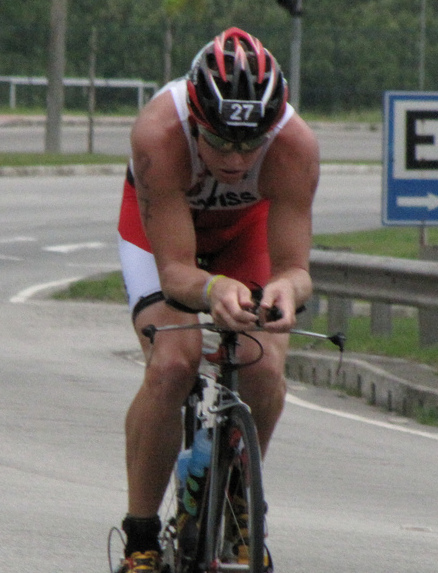 Luke McKenzie Ironman Bresil 2010